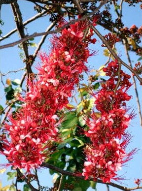 ประดู่แดง